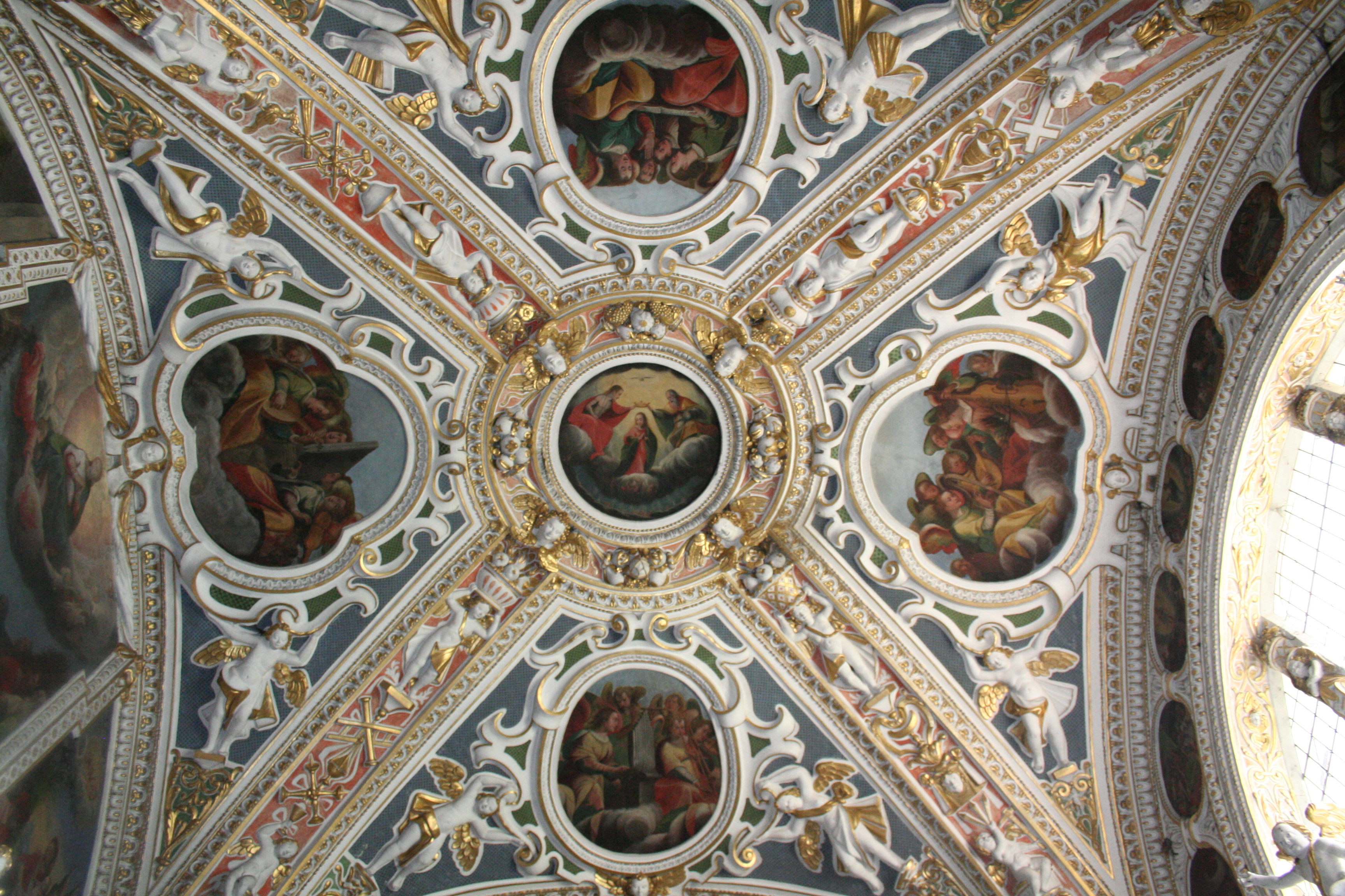 Kirche Sta. Maria Assunta Calanca: Chorhimmel